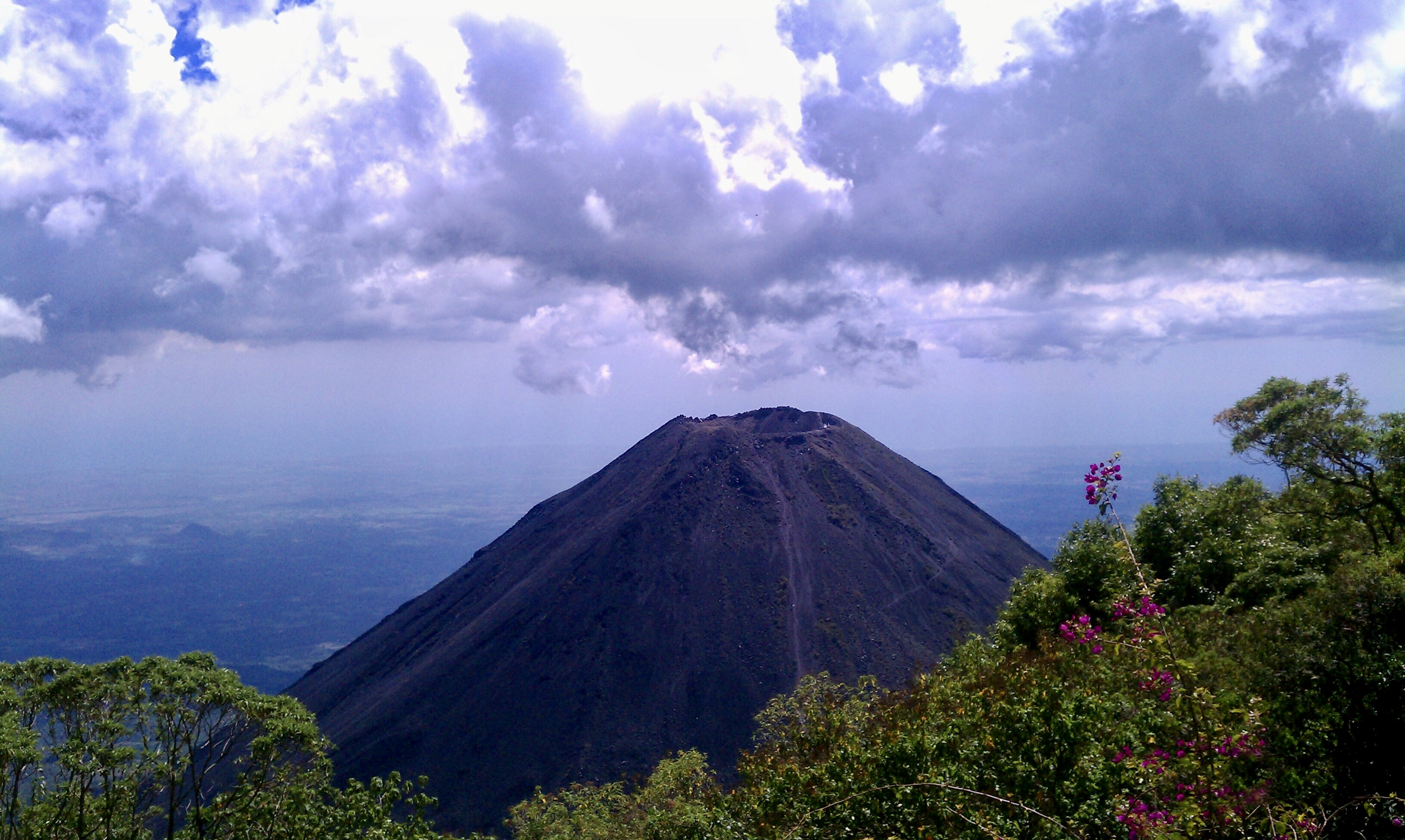 Volcan de Izalco desde mirador del Hotel